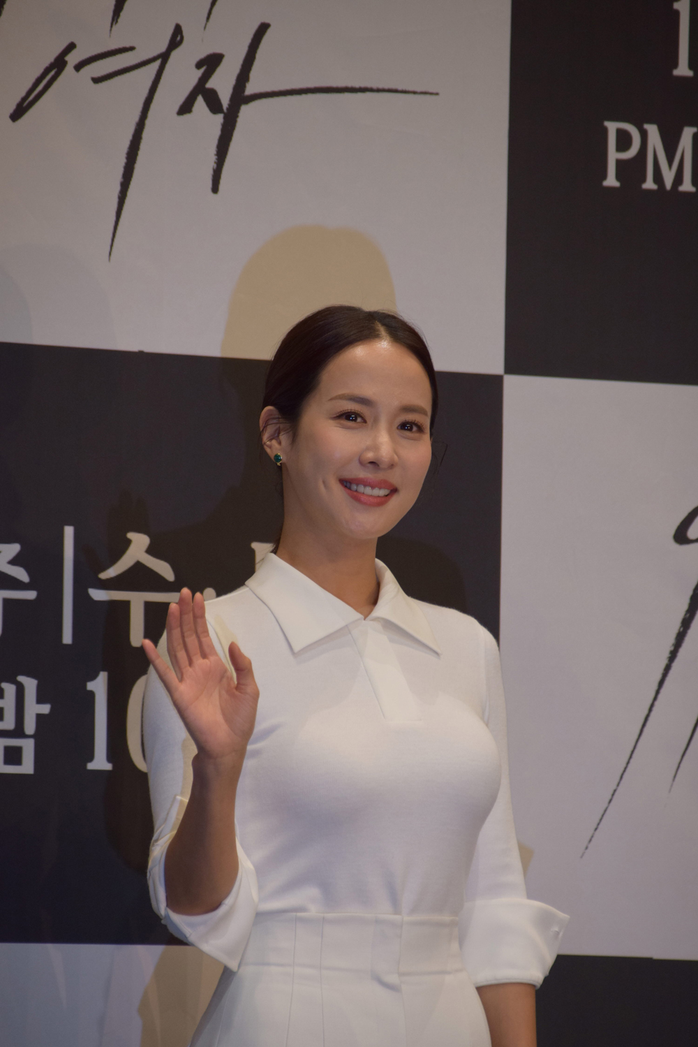 KBS드라마 '99억의 여자' 제작발표회 현장 (2019년 12월 3일)